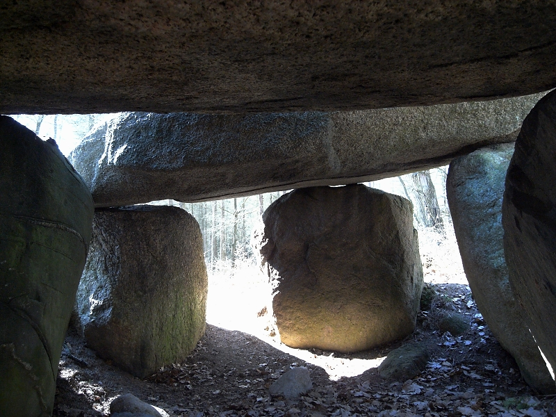 Kammer des Hünengrabes bei Klein Görnow